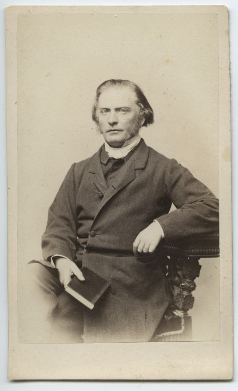 Portree: Carl August Pezold, Märjamaa Maarja koguduse õpetaja, Maa-Lääne praostkonna praost 1858–1895